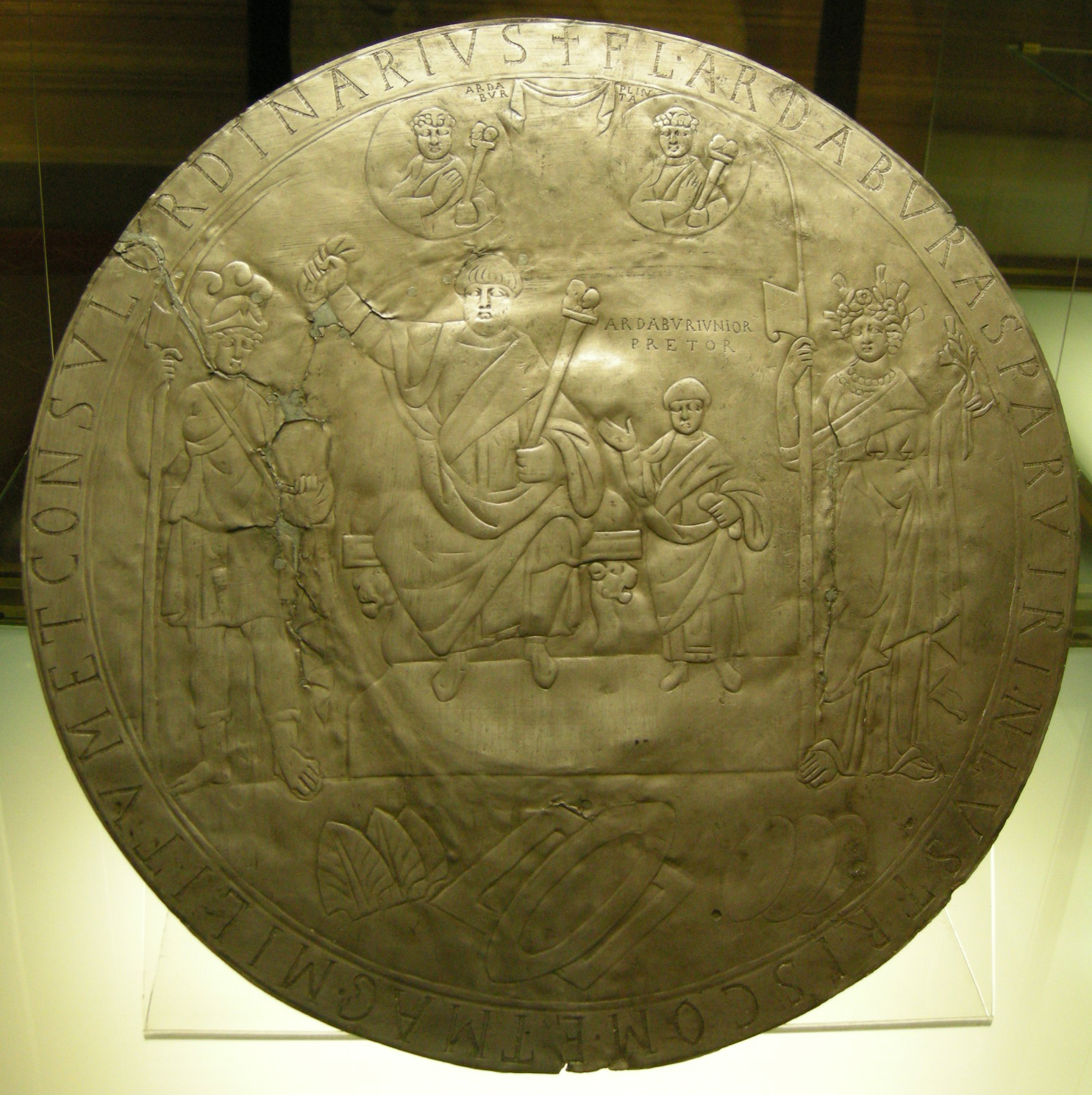 Piatto di ardaburio, argento fuso, 434 d.c. (found in 1769)